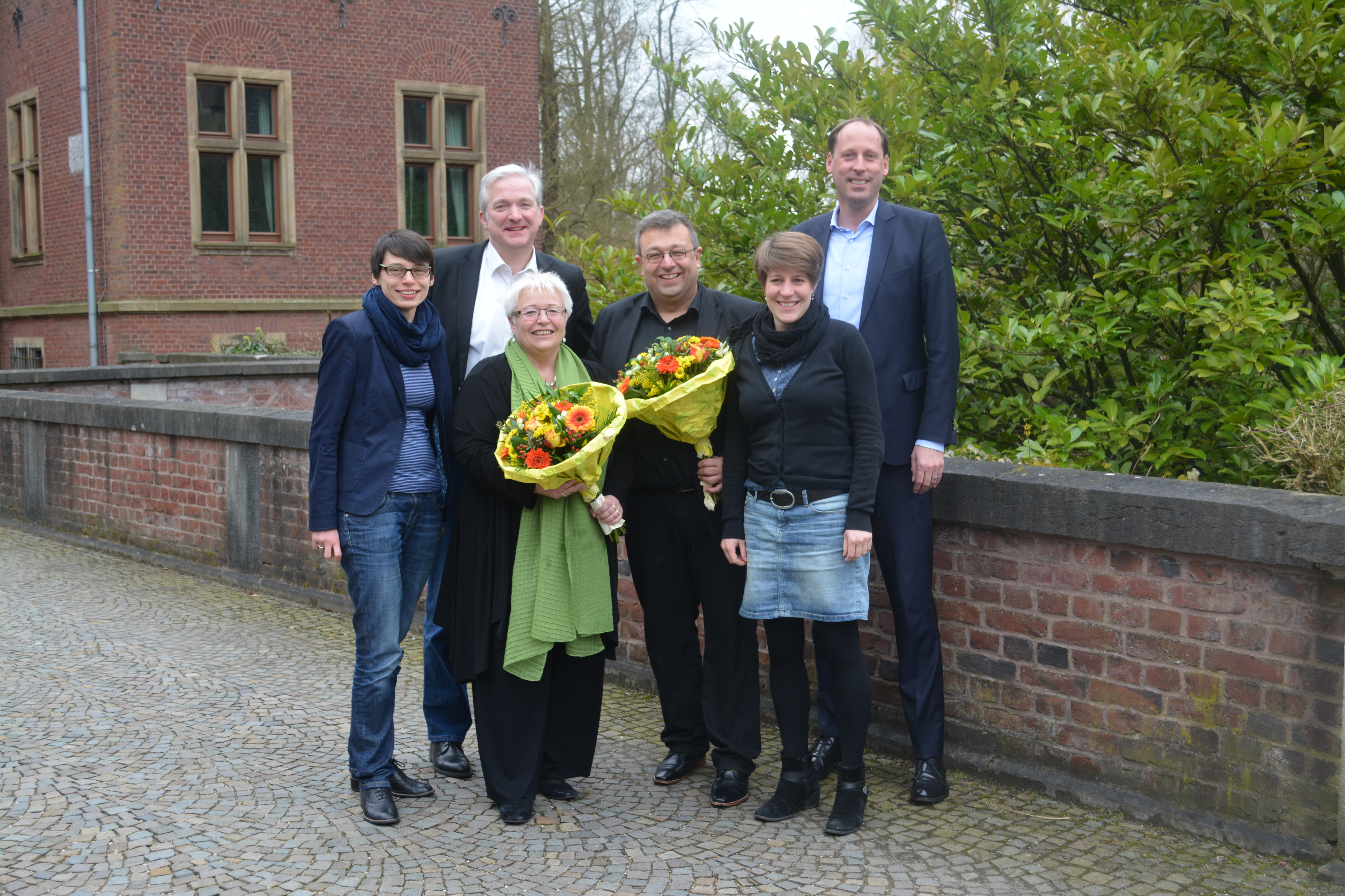 Der aktuelle Vorstand der GRÜNEN Fraktion NRW (2015), von links nach rechts: Josefine Paul, Norwich Rüße, Sigrid Beer, Mehrdad Mostofizadeh, Verena Schäffer und Stefan Engstfeld